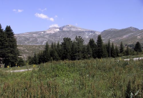 L'Uludag est une montagne qui culmine à 2490 mètres, juste à côté de la ville de Bursa. La région est aussi un parc national. Par ailleurs l'Uludag est un des plus grands et plus connus domaines skiables de Turquie. L'Uludag est facilement accessible à partir de Bursa, soit via la route (en voiture ou en dolmus) soit via un téléphérique (Teleferik).